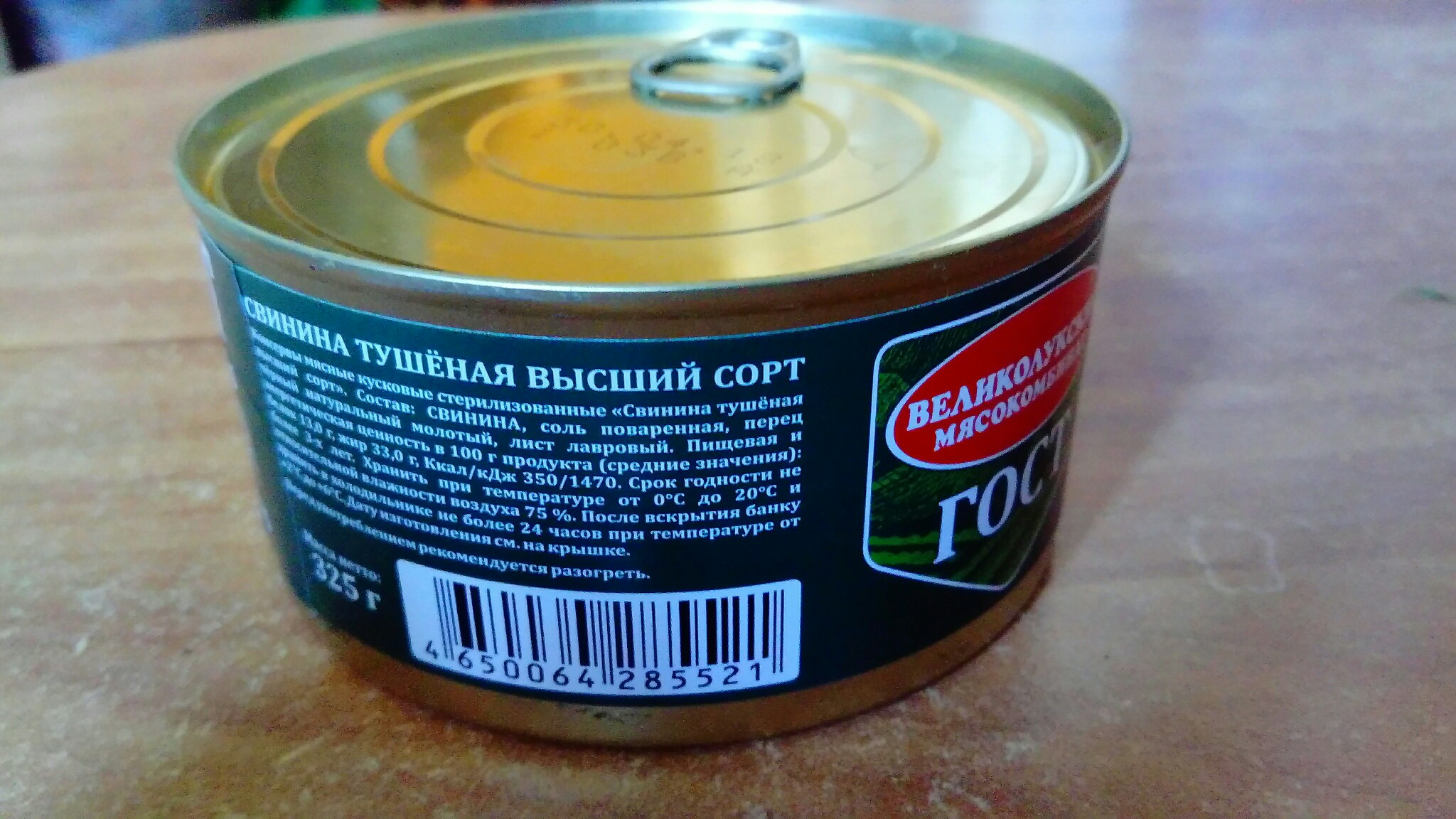 Свинина тушеная "Великолукского мясокомбината", сроком годности 3 года.